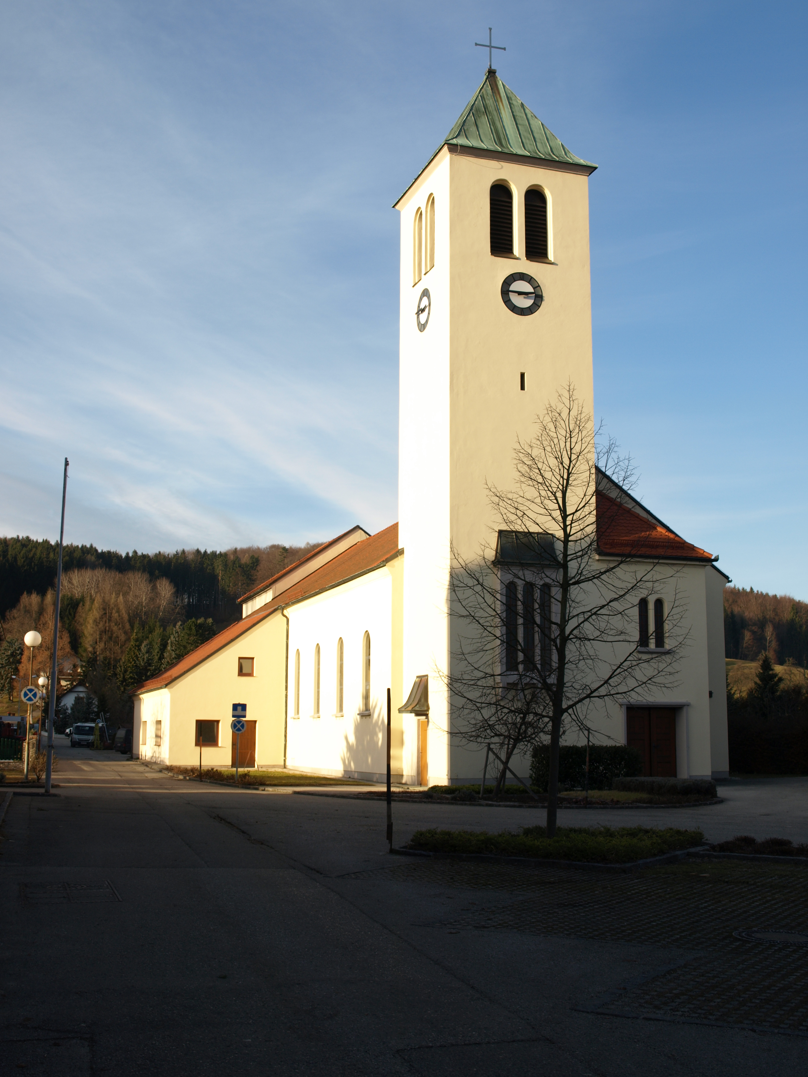 Kath. Pfarrkirche Hl. Familie